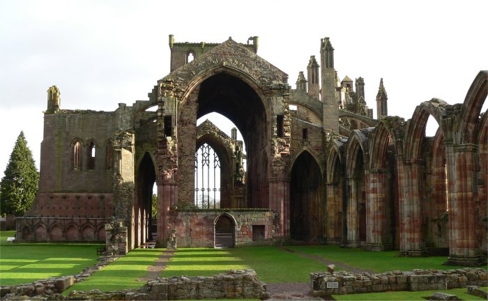 Melrose Abbey,Scotland